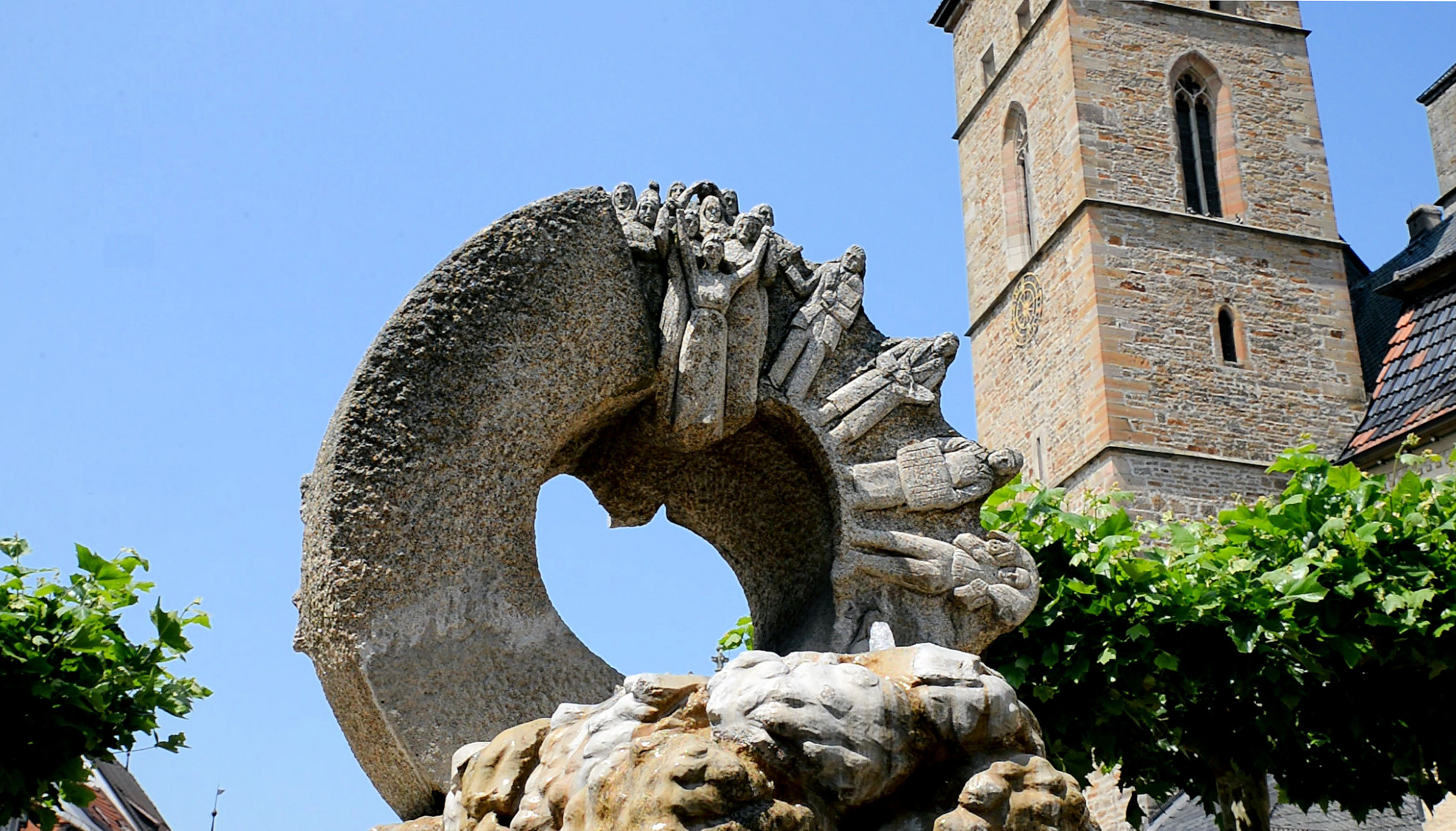 Denkmal als Teil des Marktbrunnens in Gerolzhofen